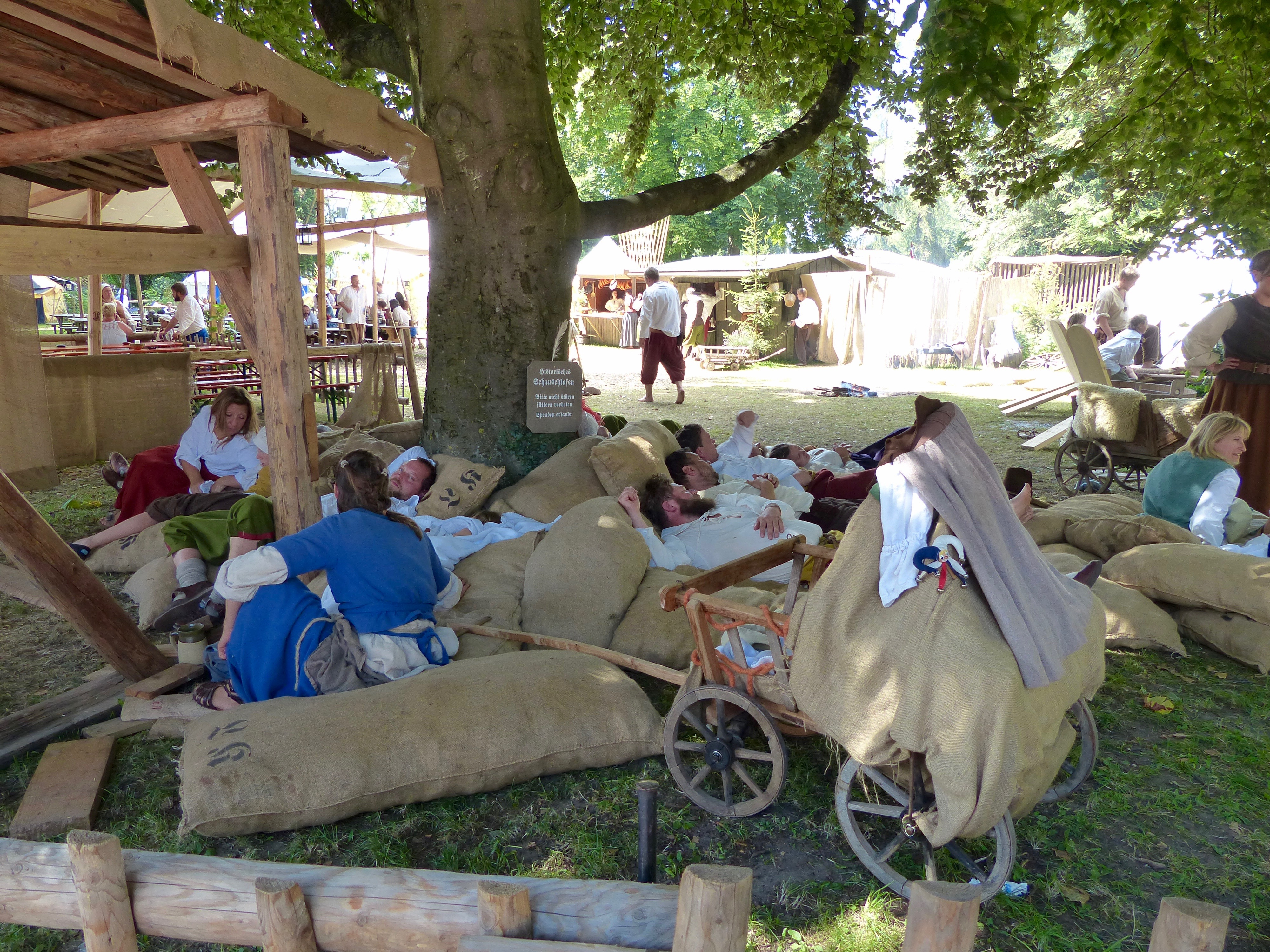 Wallensteinfestspiele 2016 - Grimmelschanze - Lager des Tross Piccolomini